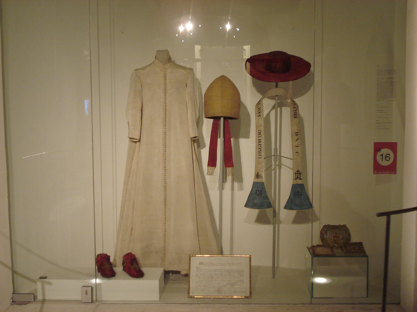 Dëst Bild weist eng Rëtsch vu Gebrauchsgéigestänn vum Carlo Borromeo. Se sinn an der Wiener Karelskierch ausgestallt.